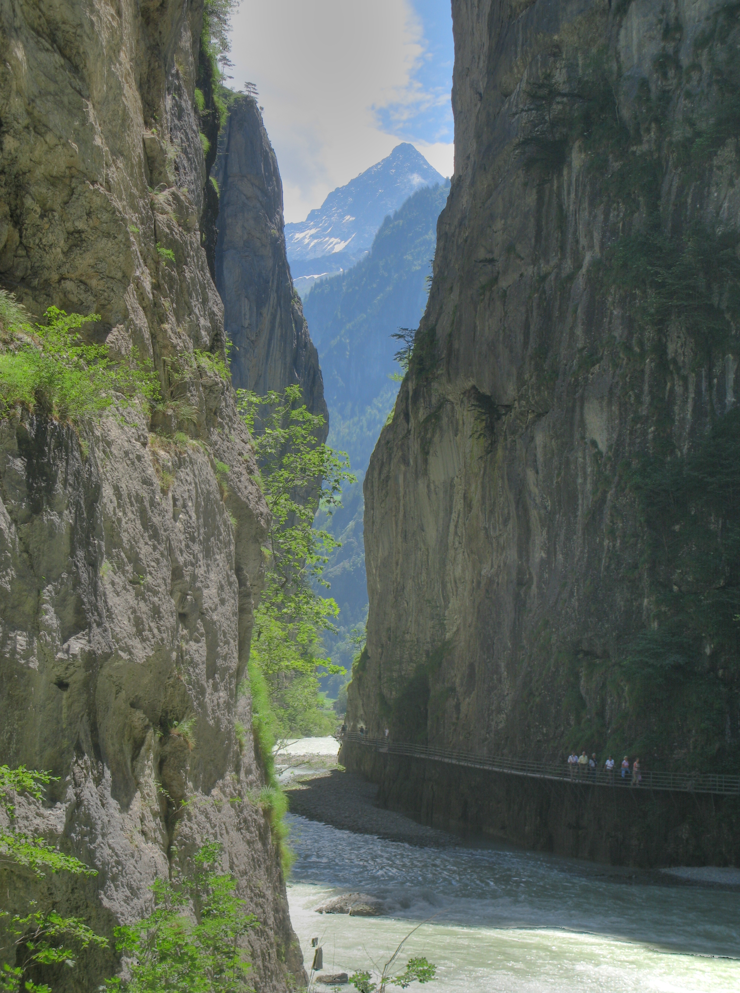 Aareschlucht (Aar gorge) near Meiringen